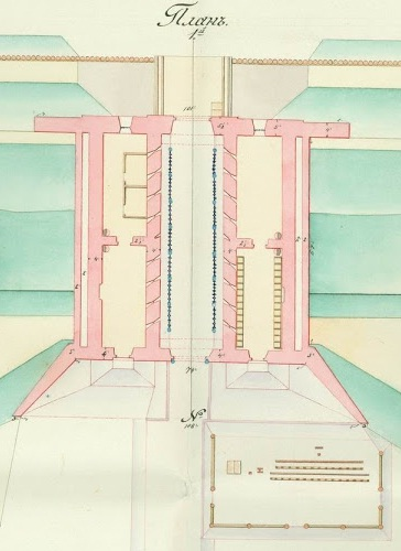 Брэсцкая крэпасць. Усходняя брама. План 19 ліпеня 1867